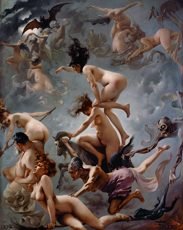 "Walpurgisnacht. Der Aufbruch der Hexen" (auch "Hexen auf dem Weg zum Sabbat") von Luis Ricardo Falero, 1878. Öl auf Leinwand. Breite: 118,2 cm, Höhe: 145,5 cm. Privatsammlung, Monza, Italien. Unbearbeitetes Originalfoto. Originale Helligkeit! Nicht aufgehellt und nicht abgedunkelt.